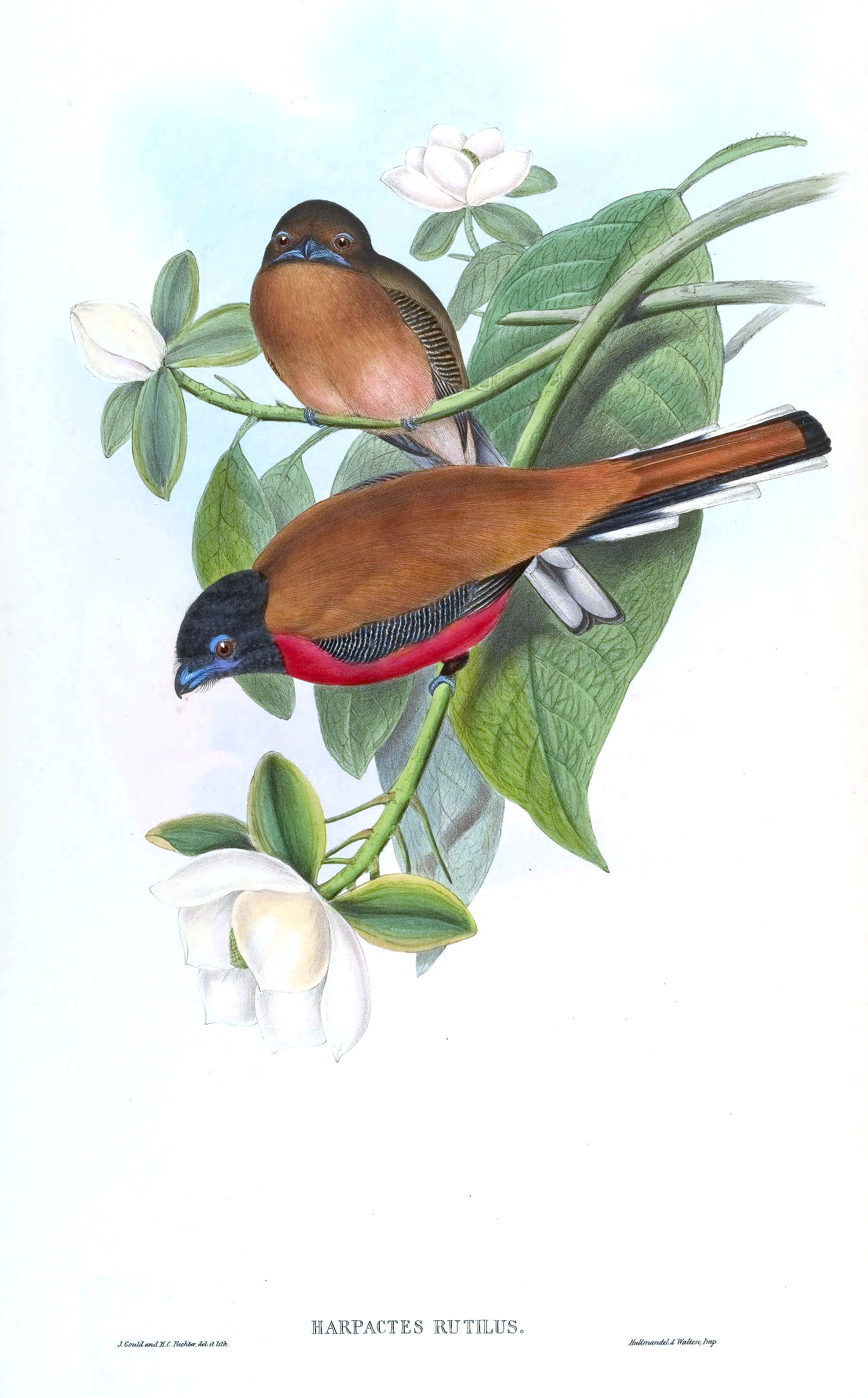 Harpactes rutilus